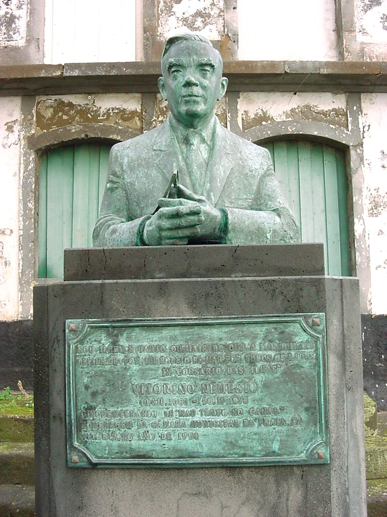 Vitorino Nemésio, Praia da Vitória, ilha Terceira, Açores, Portugal.